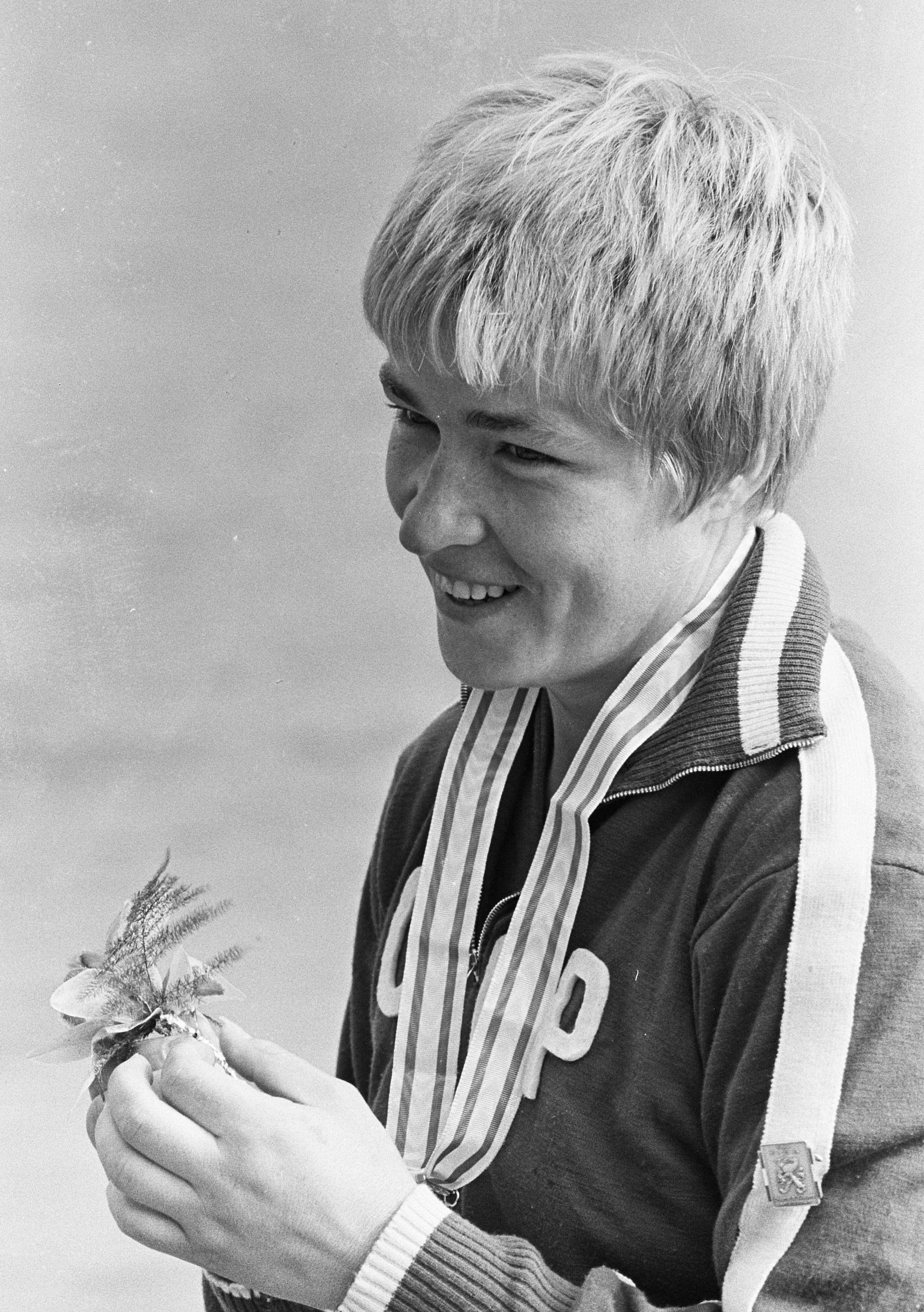 Europese Roeikampioenschappen dames 1966, Galina Konstantinova met medaille en bloem, winnares nummer skif